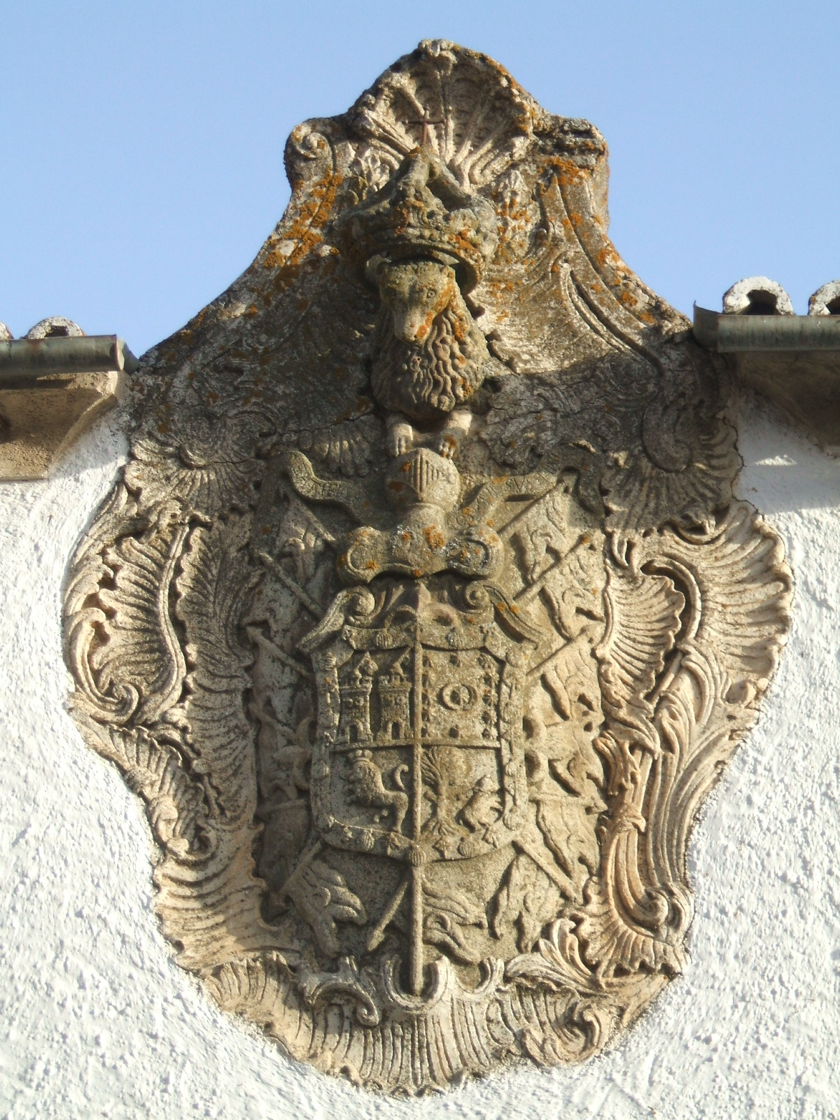 Navas del Madroño. Escudo barroco de los Tejada